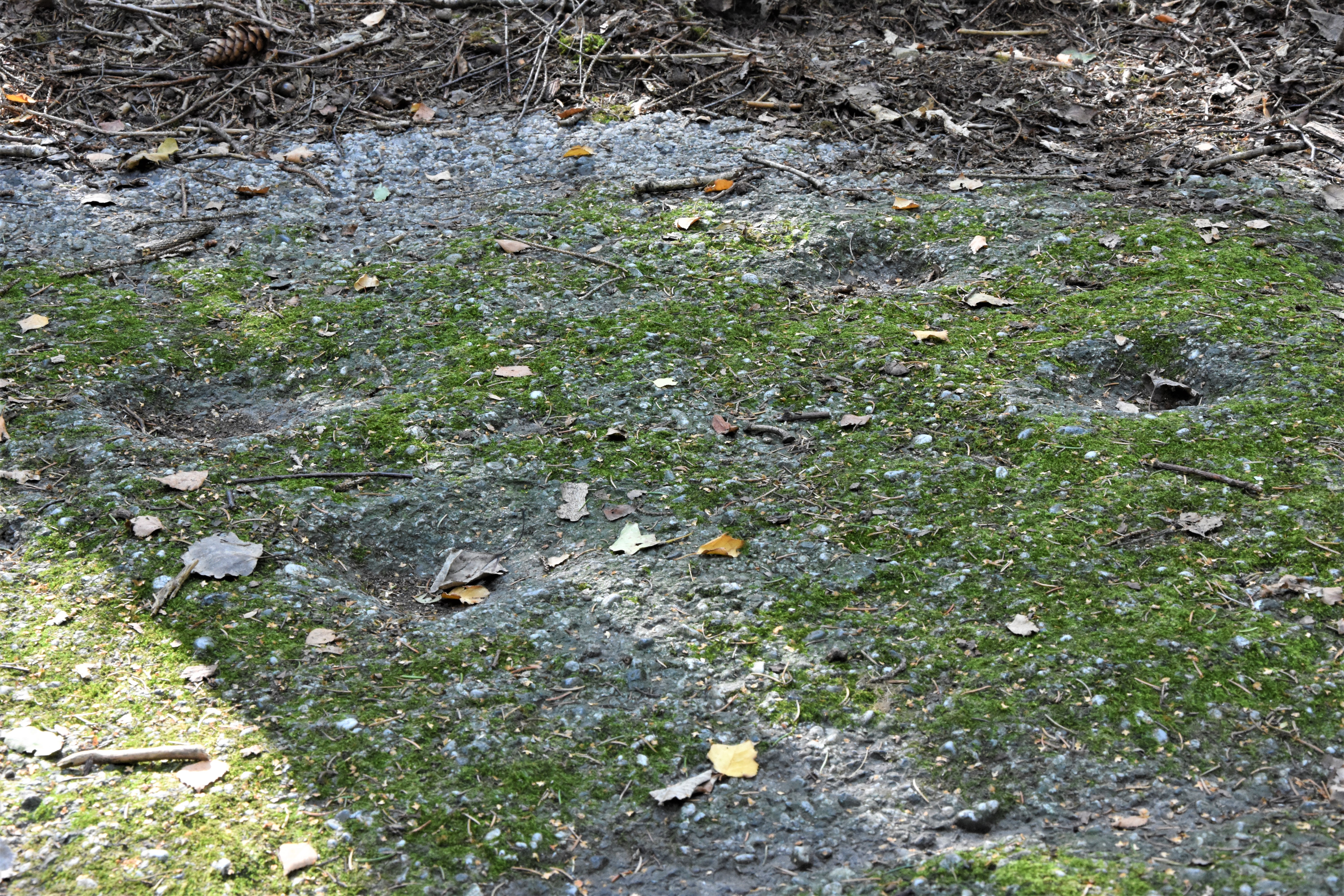 Knieanbetungsstein